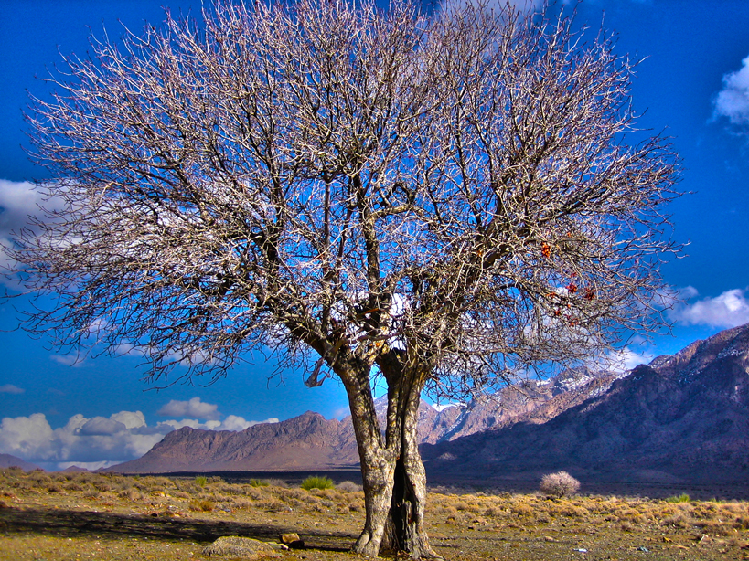 درخت بنه